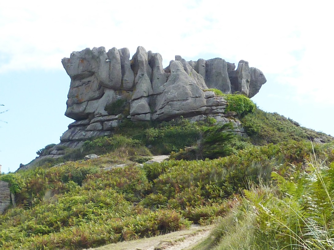 Rocher du Roi Gradlon dominant la plage de la grêve blanche